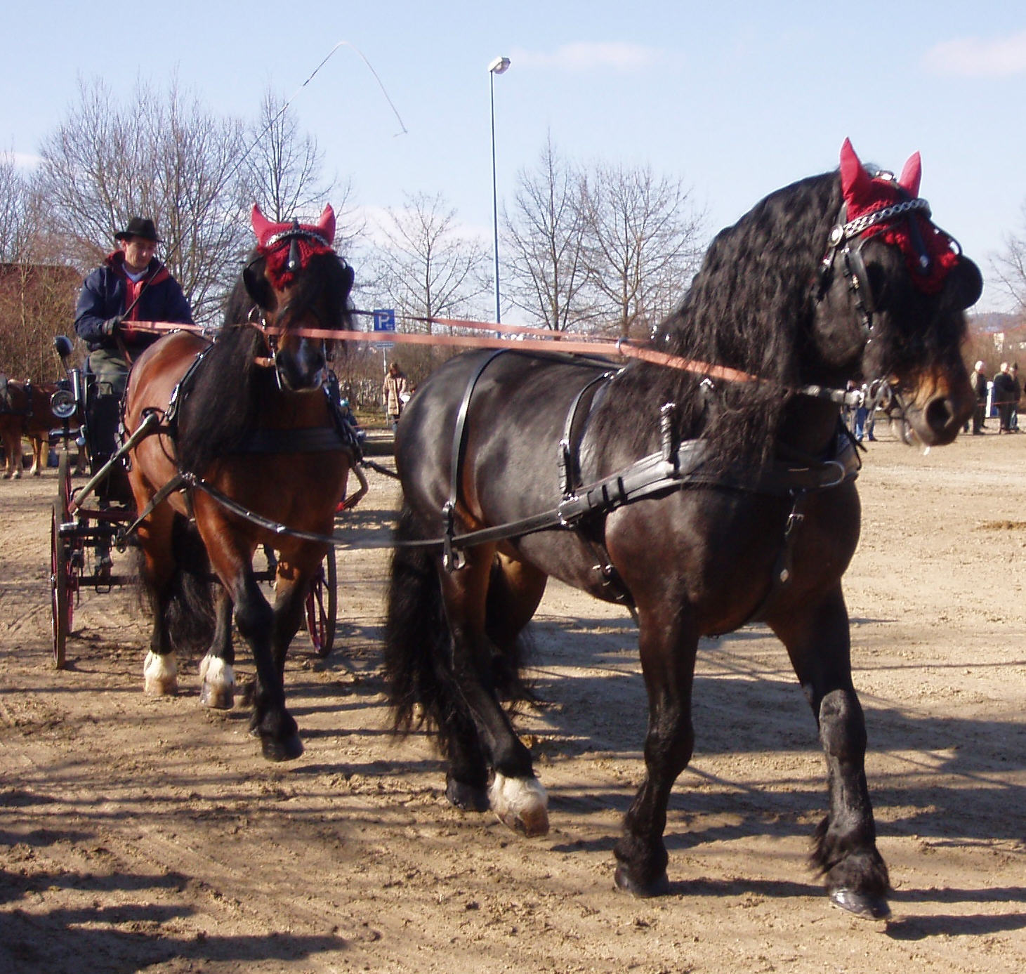 Noriker in Tandemanspannung